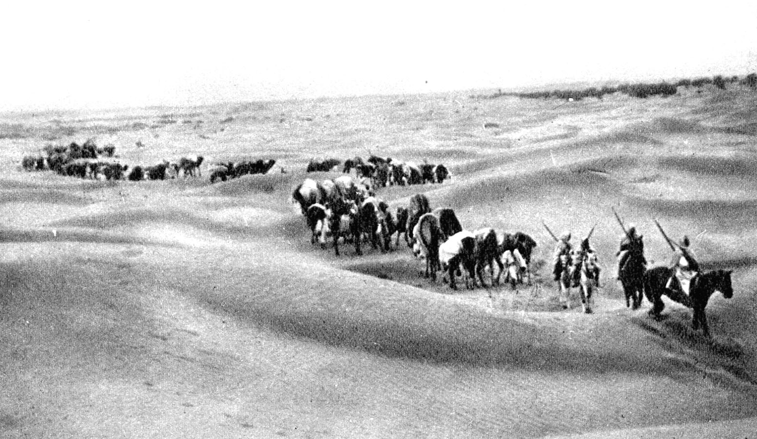 Kiff tebbi, regia di Mario Camerini - produzione A.D.I.A. Roma 1929 - foto scena deserto libico